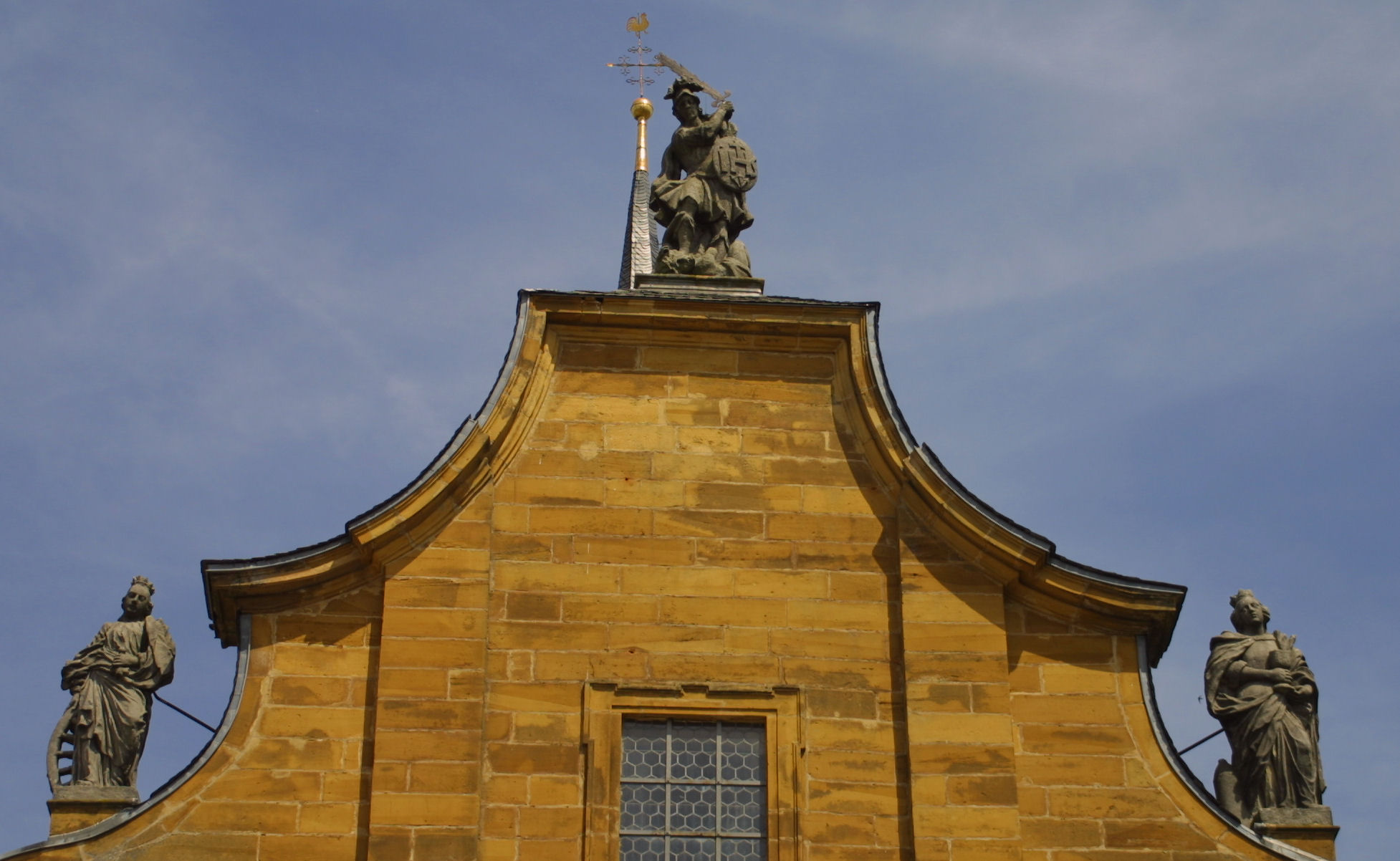 Sankt Wenzeslaus (Litzendorf)